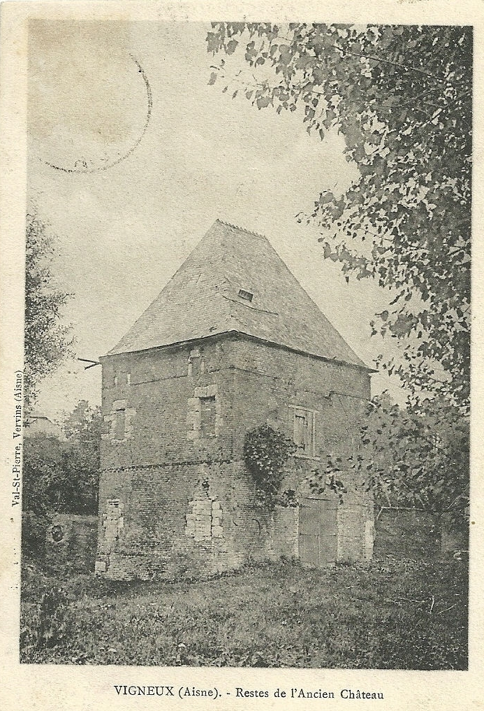 Restes de l'ancien château avant 1914.